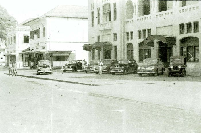 negatief. Geparkeerde auto's en militairen bij de Marine Cantine en het kantoor van de NILLMIJ, Batavia